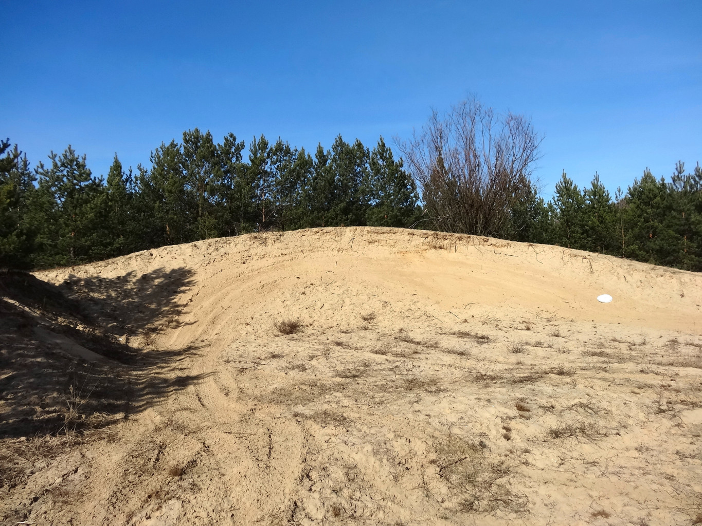 Las w Żółwinie koło Bydgoszczy, Puszcza Bydgoska